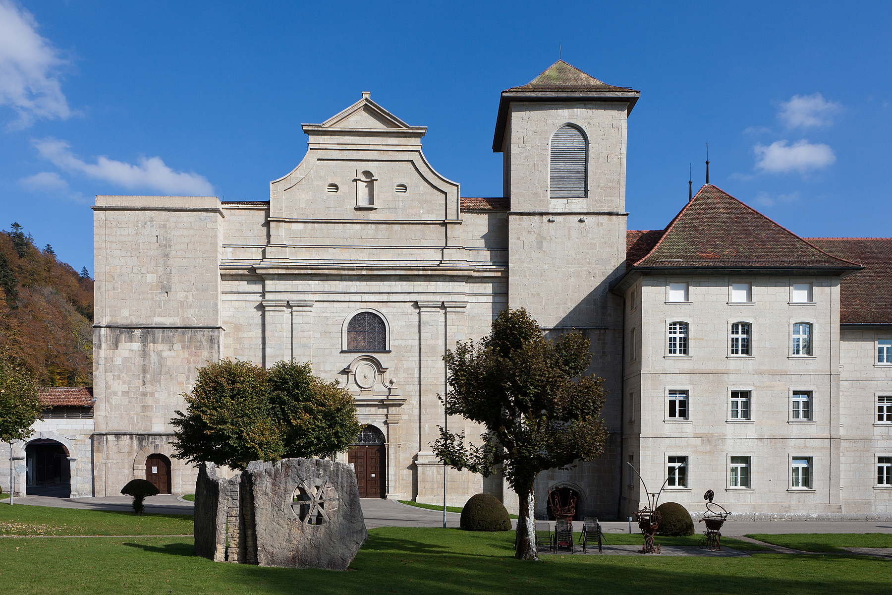 Ancienne Abbatiale à Bellelay (Commune de Saicourt) BE